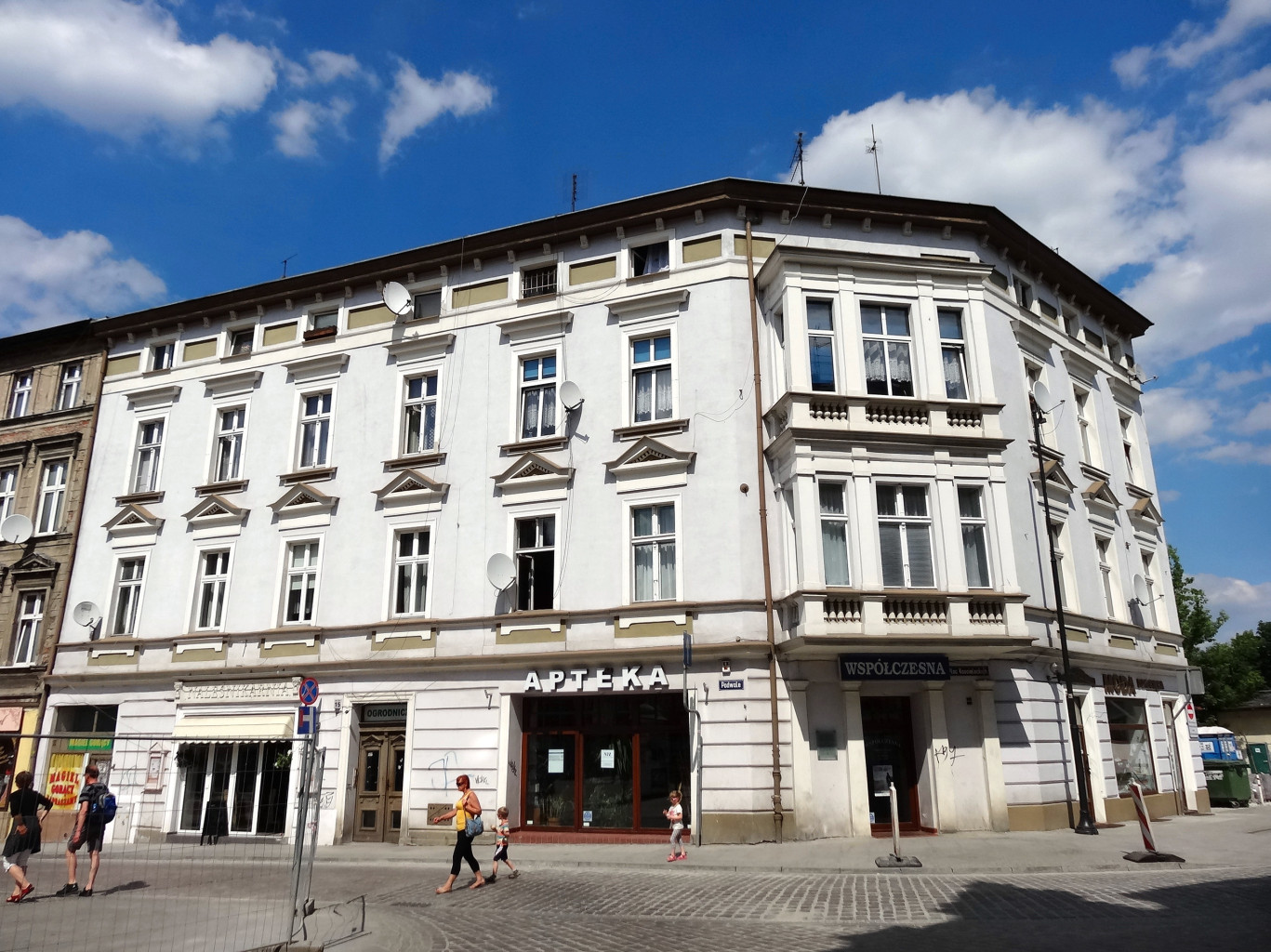 Ulica Podwale w Bydgoszczy